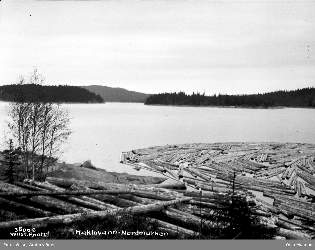 Tømmerfløting på Hakkloa, 1928